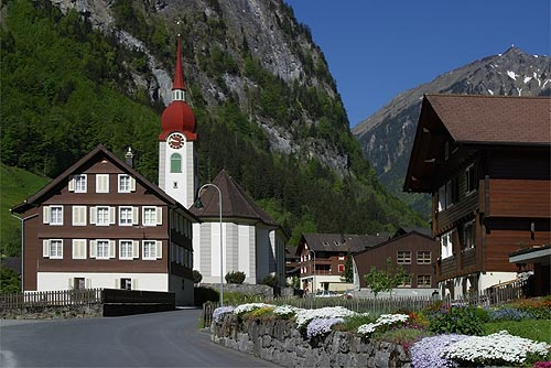 Dorfeingang von Isenthal (Nr. 03.1-4718)